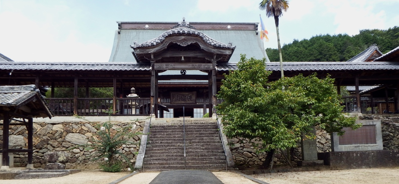 高昌寺の中雀門